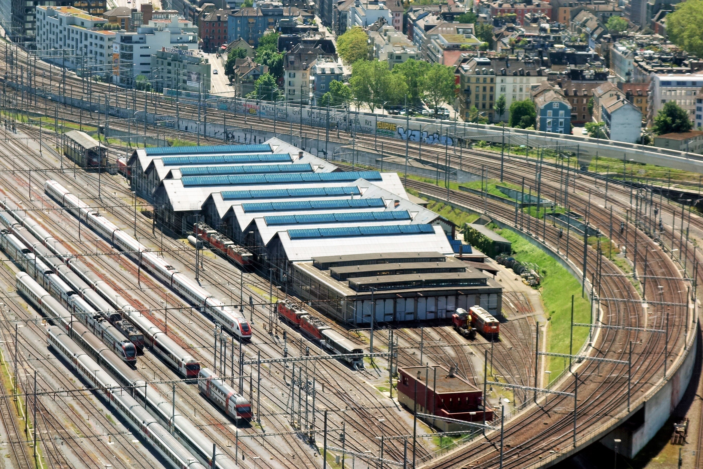 Lokomotivdepot Zürich, Schweiz